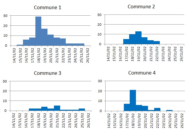 Courbes épidémiques d'une même épidémie de gastro-entérite: variation en fonctions des lieux de recueil des cas